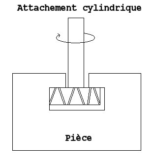 dessin personnel d'une fraise pour usinage de rainures en T